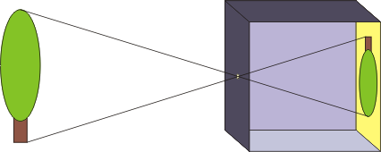 esquema de cámara oscura Imagen diseñada por Josemanuel Categoría:Wikipedia:Wikipedistas (imagen)